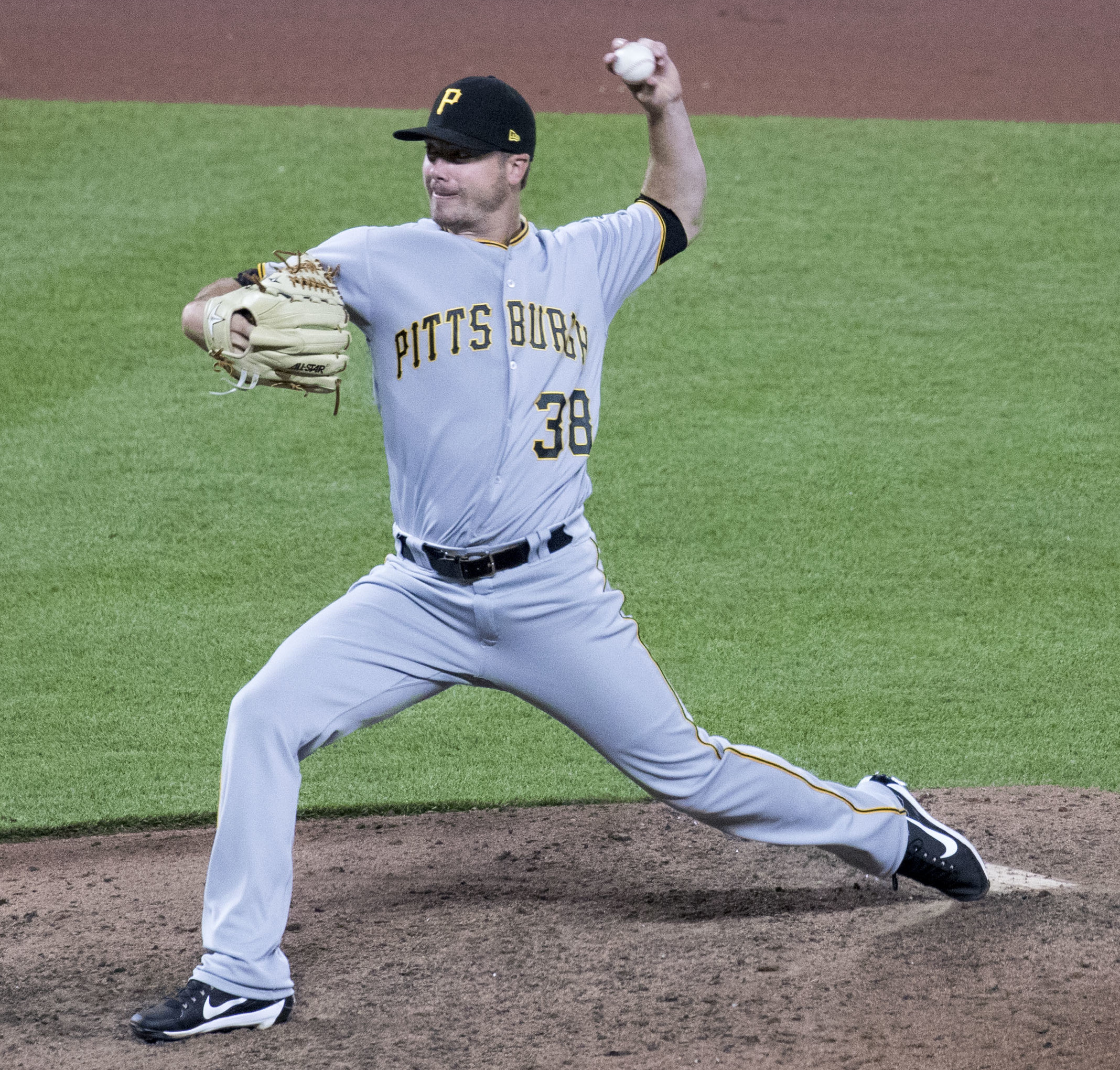 Pirates at Orioles 6/6/17